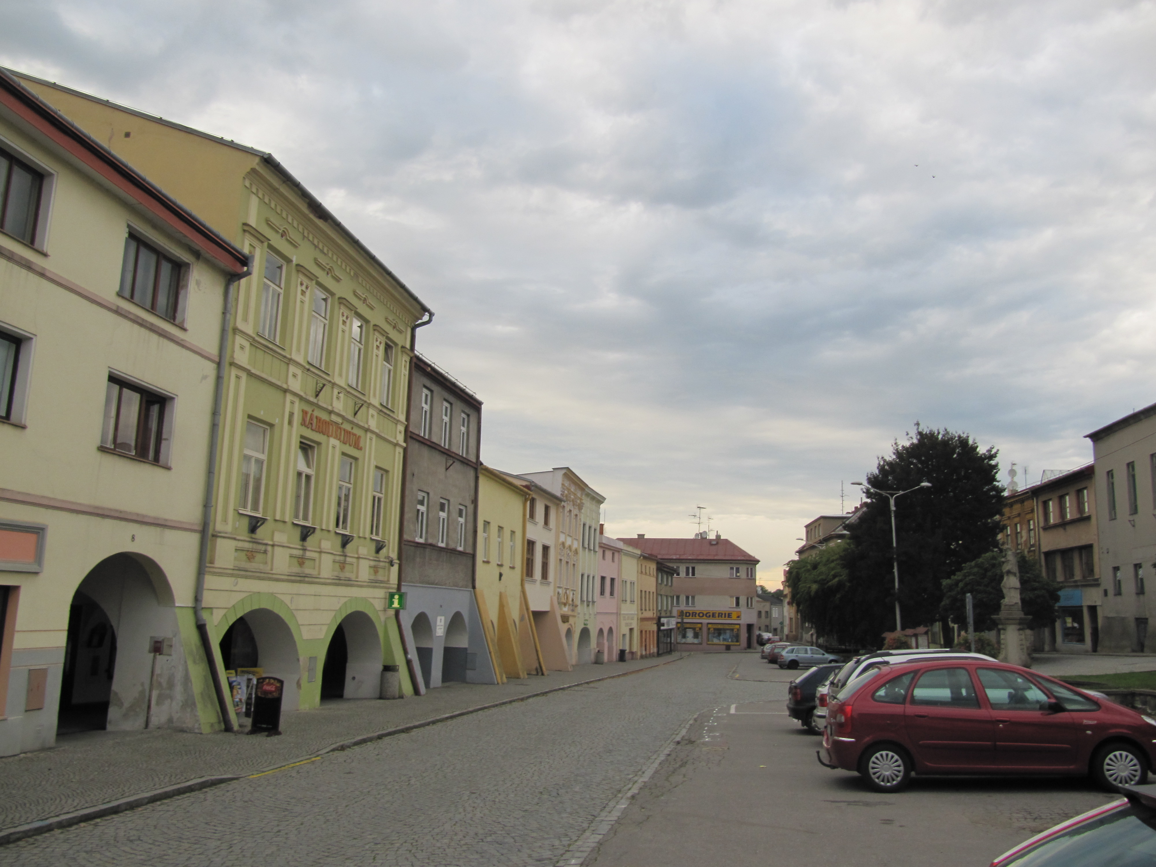 Brušperk